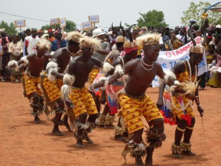 photo de danseurs traditionnels otammari pris lors du Festival des Arts et de la Culture Tammari en 2010 FACTAM